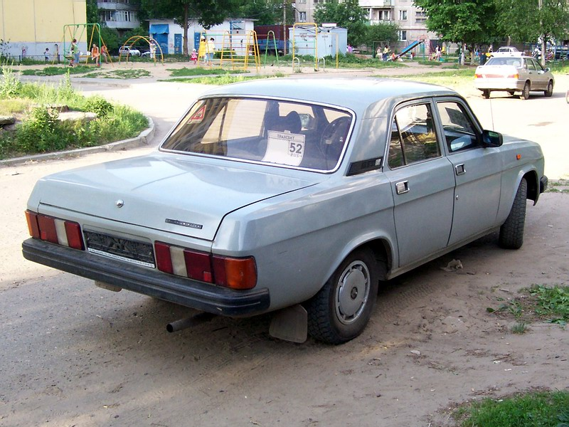 Мой ГАЗ-31029 1995 г/в. Все родное кроме резины и панели приборов от ГАЗ-3102. Пробег на момент фотографии 76 тыс. км.